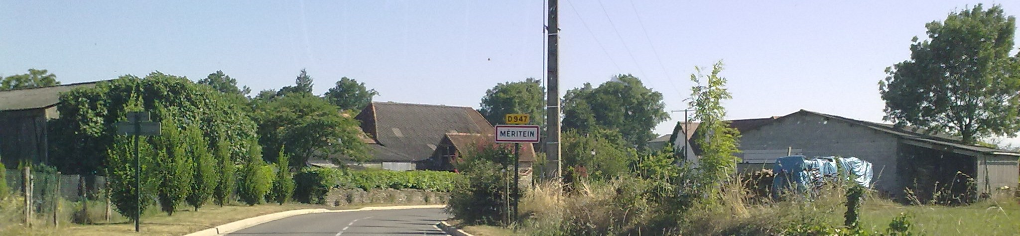 Méritein le 18 juillet 2010, France.